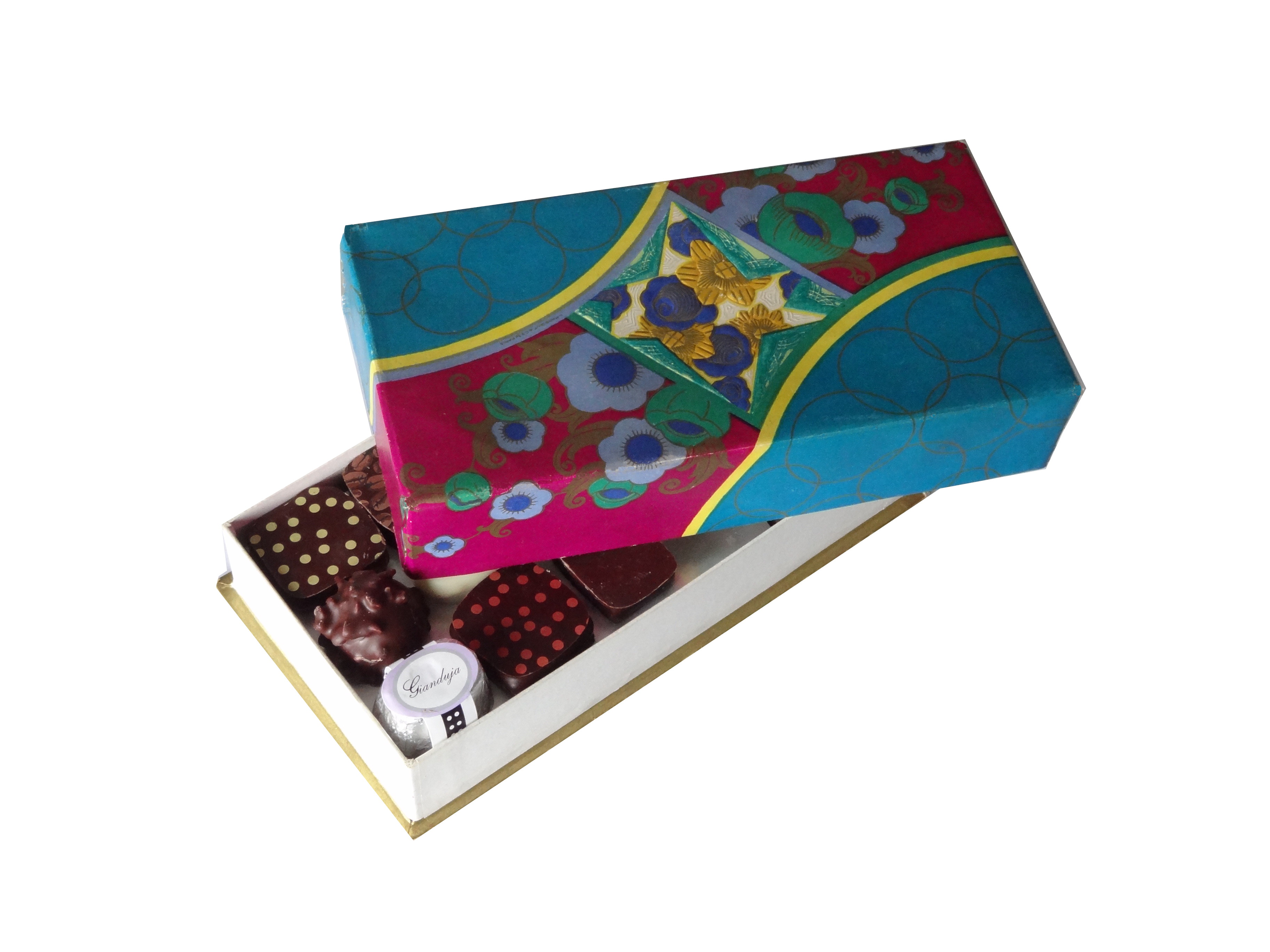 boite Weiss 1920